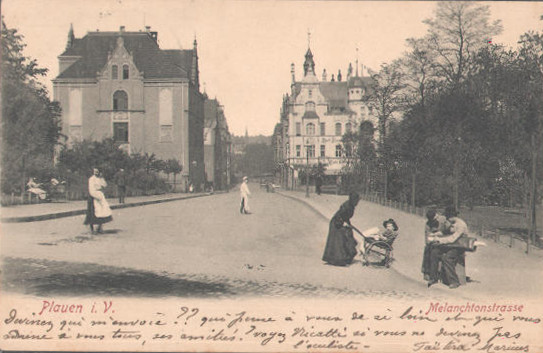 Melanchthonstraße Plauen auf einer alten Ansichtskarte